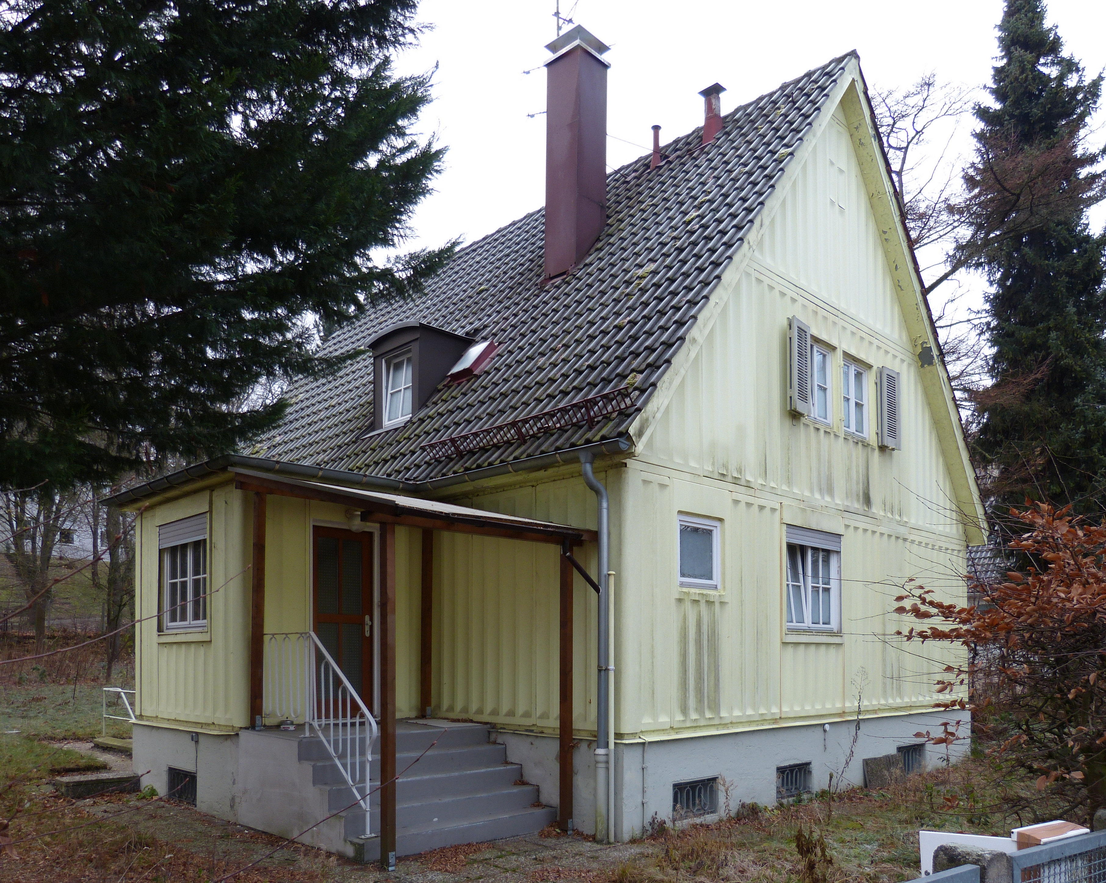 MAN-Stahlhaus, 1952 errichtet.